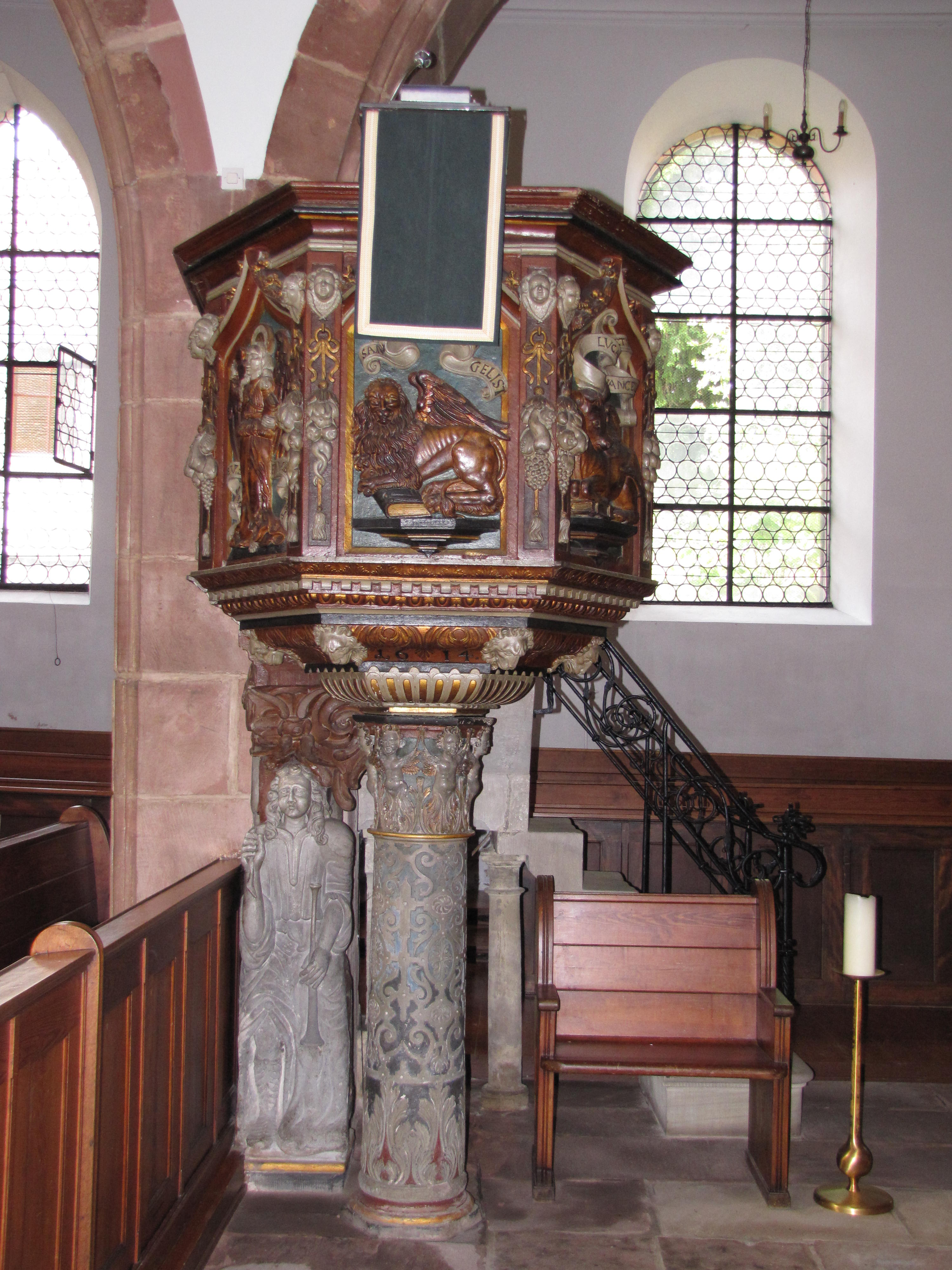 Alsace, Bas-Rhin, Église protestante de Bouxwiller (PA00084645, IA67009578). Chaire pastorale (XVIe-XVIIe): This object is classé Monument Historique in the base Palissy, database of the French furniture patrimony of the French ministry of culture, under the references PM67000733 and IM67013984.